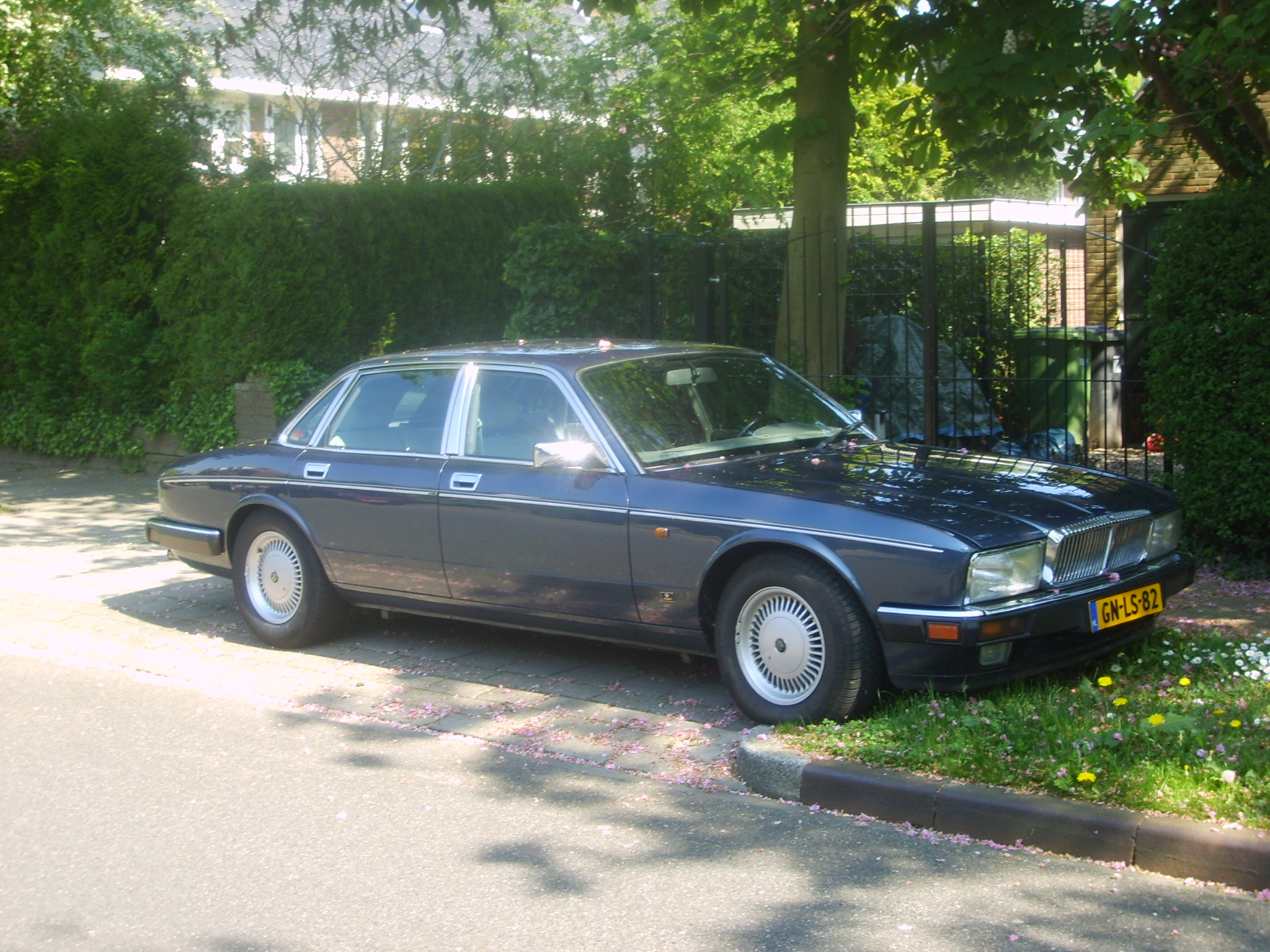 GN-LS-82